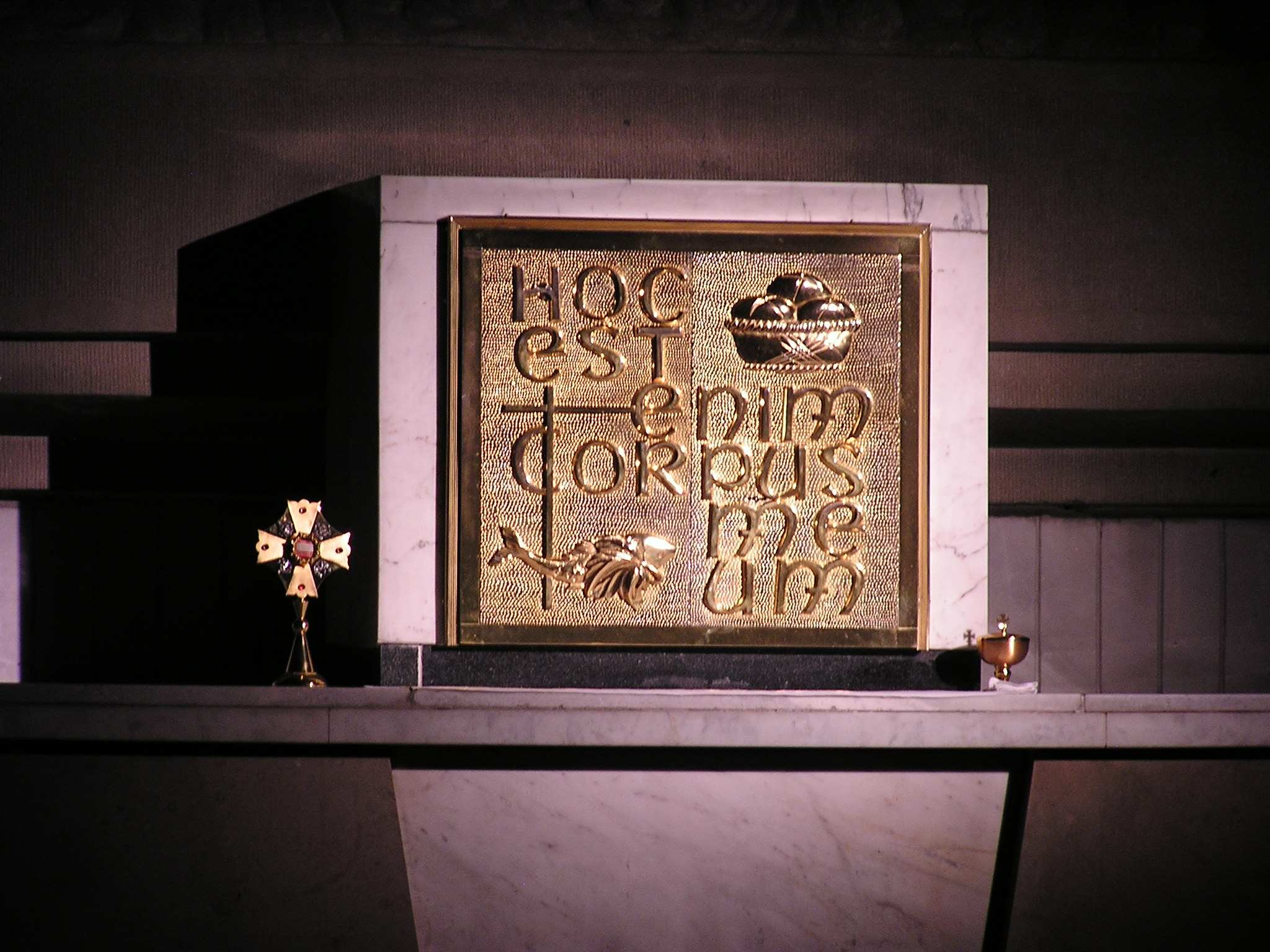 Tabernakulum w kościele Wyższego seminarium Duchownego w Ołtarzewie